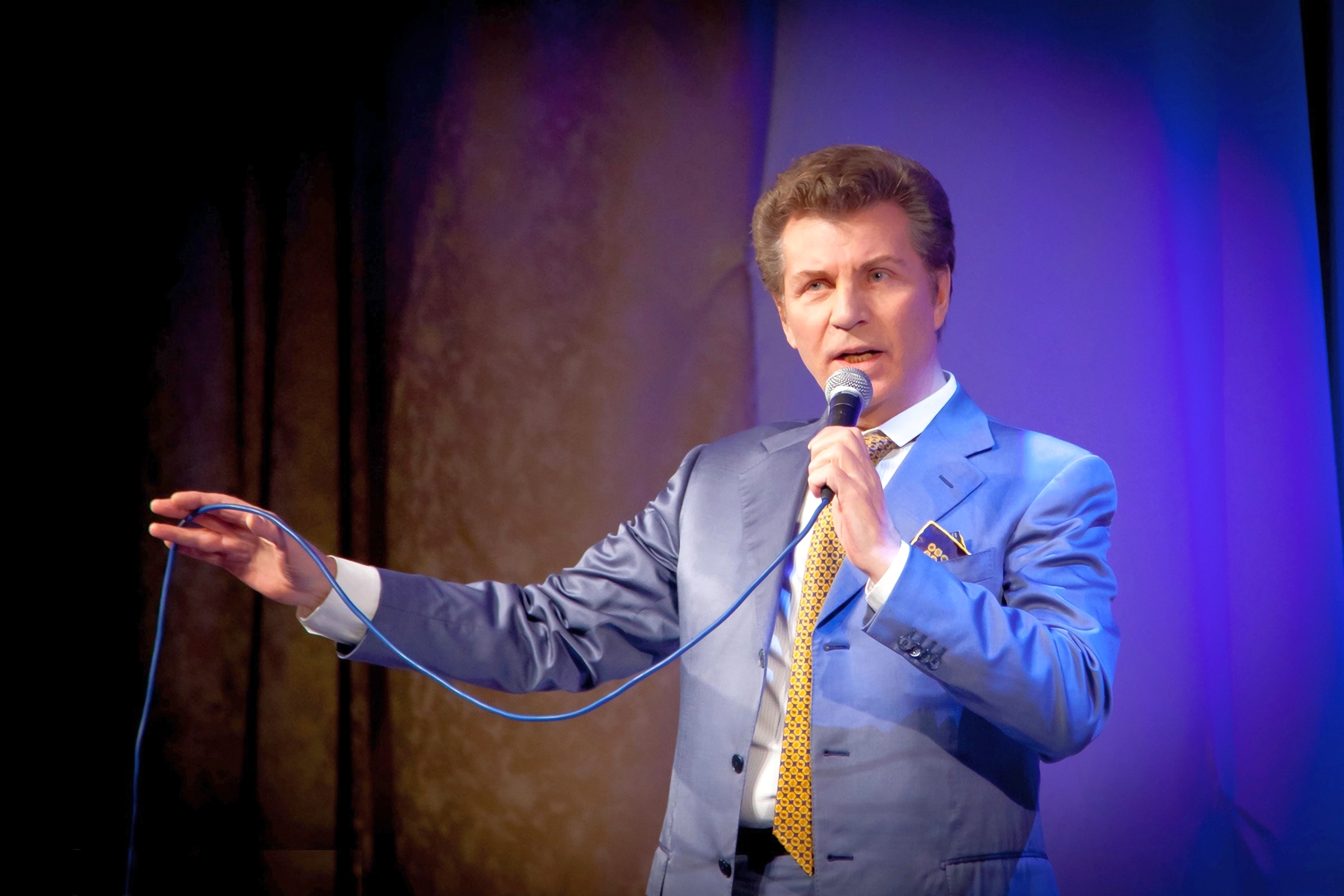 Ярослав Александрович Евдокимов. Концерт группы «Мы из СССР» в ЦКиОМ города Северодвинска 22 марта 2014 года.